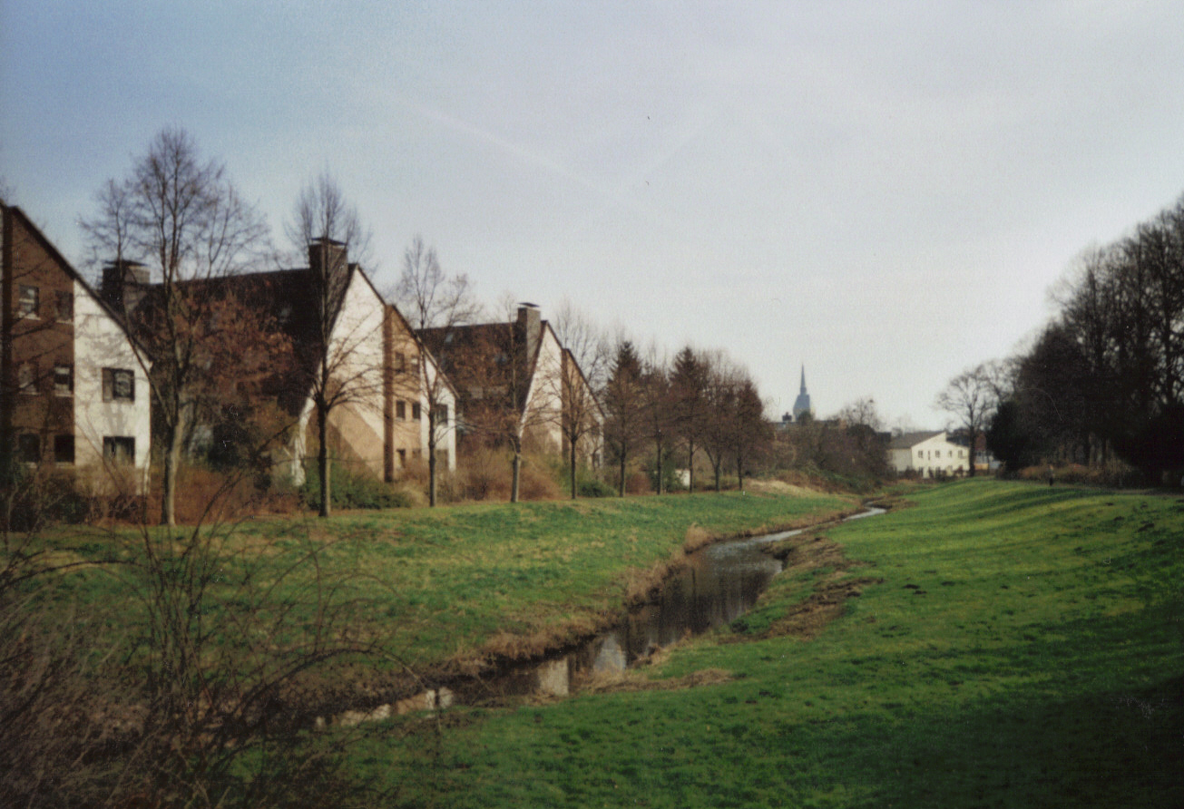 Blänkebach